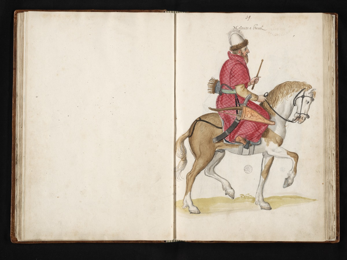 "Конный московит", акварель Лукаса де Геера из книги "Théâtre de tous les peuples et nations de la terre avec leurs habits et ornemens divers, tant anciens que modernes, diligemment depeints au naturel par Luc Dheere peintre et sculpteur Gantois"